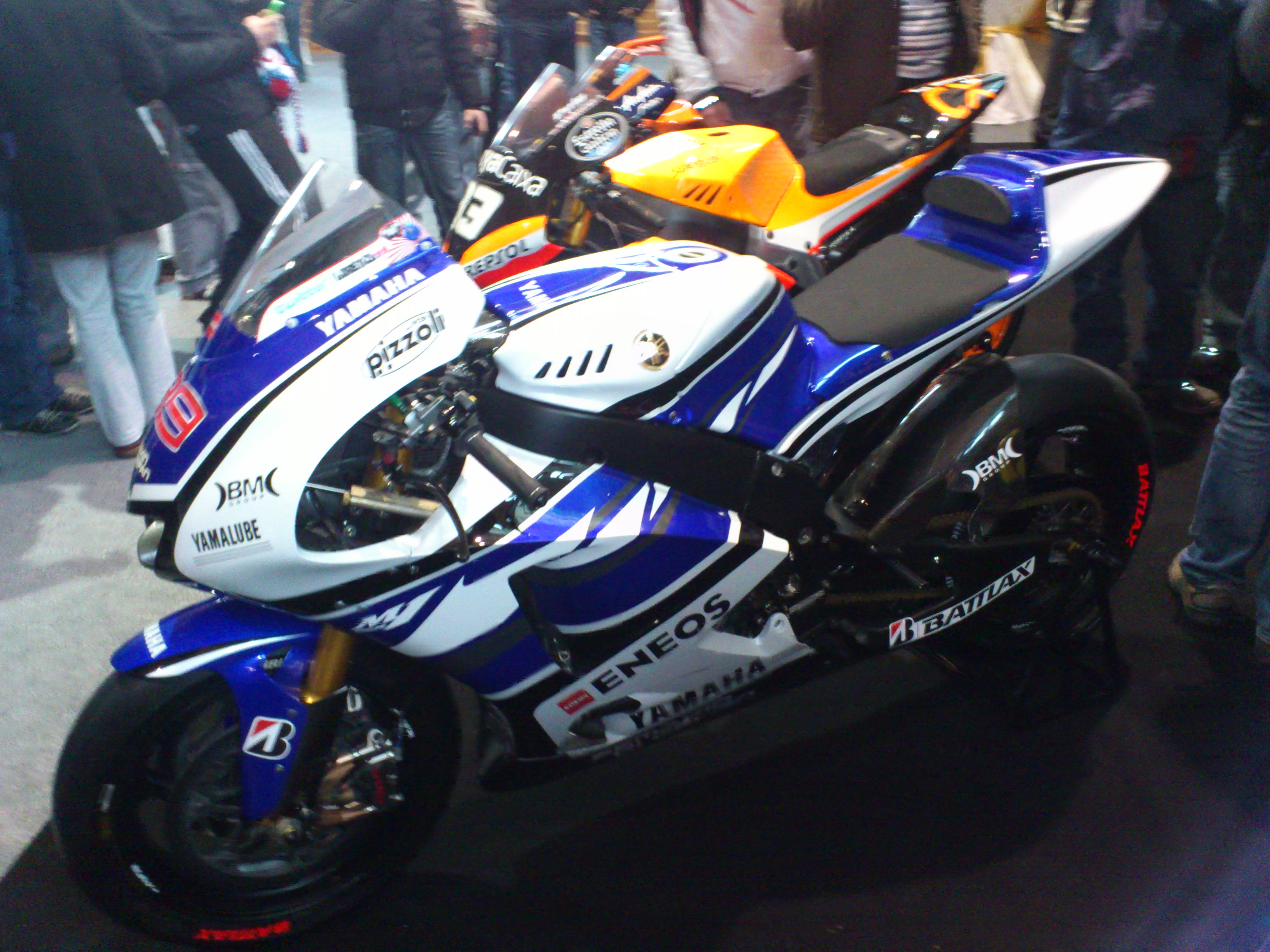 Yamaha Lorenzo 2012 slikana v podjetju Akrapovič.